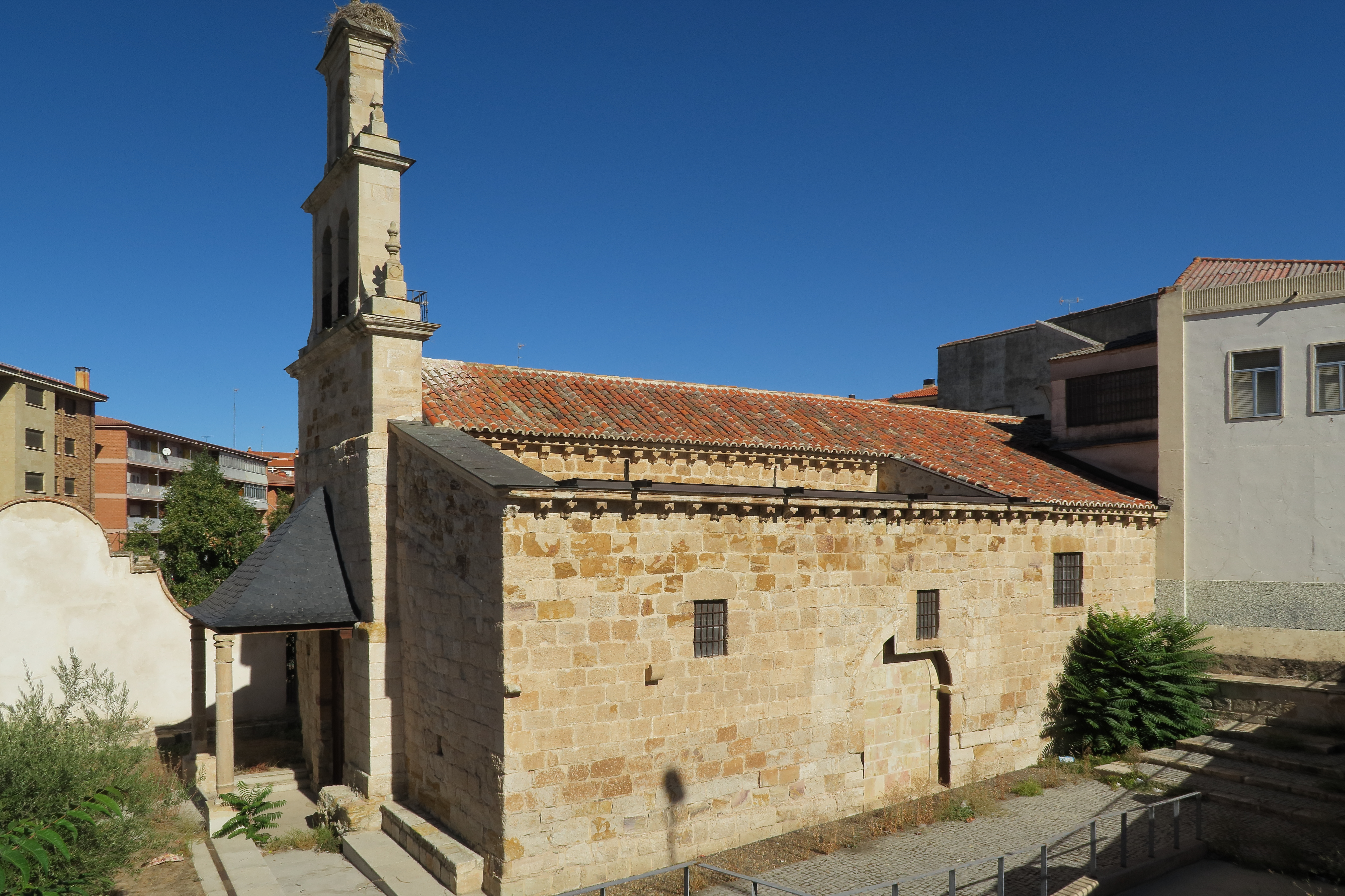 Ermita de Nuestra Sra de los Remedios, fachada sur